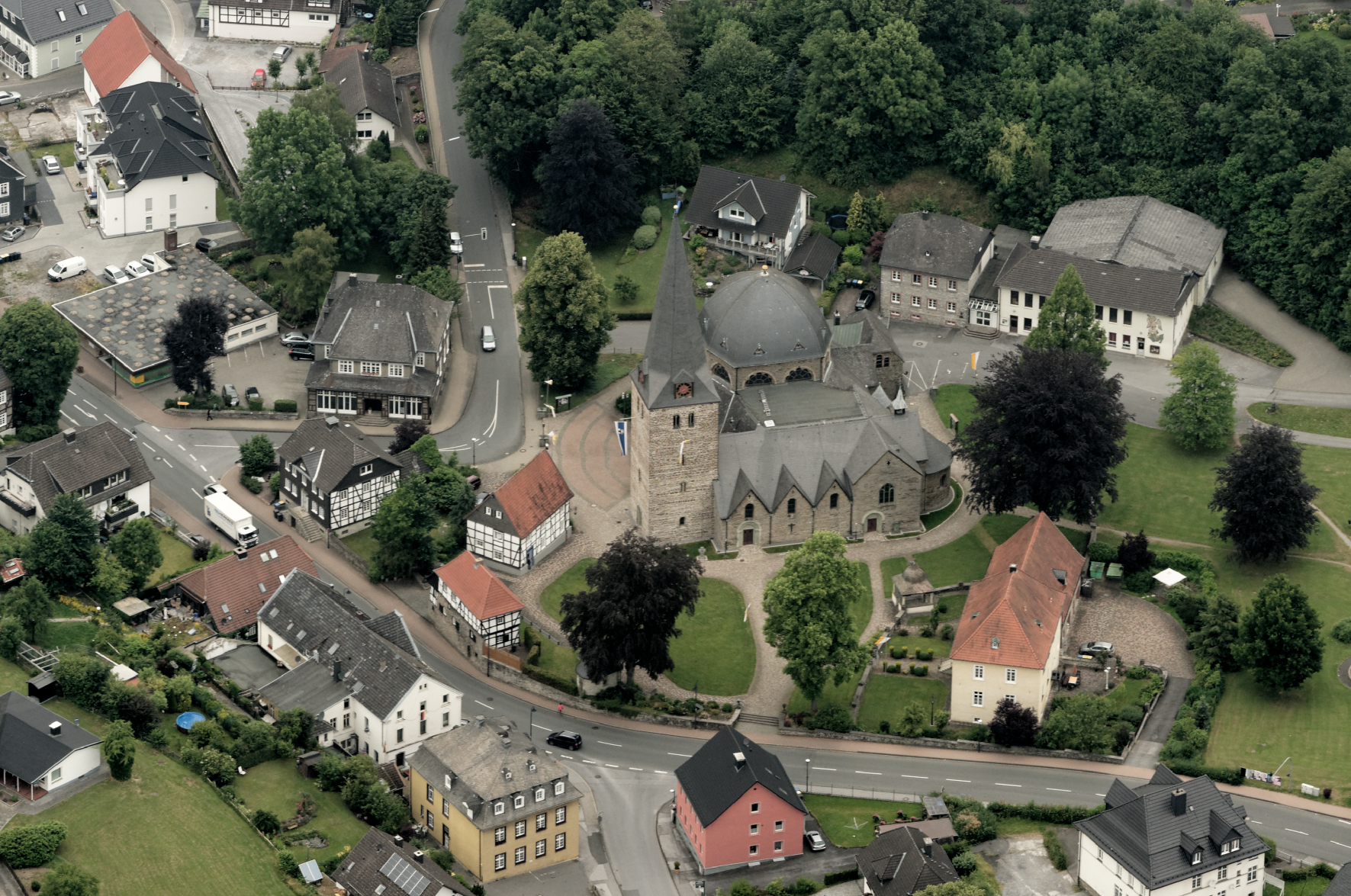 Fotoflug Sauerland Nord. Balve, Pfarrkirche St. Blasius und Umfeld The making of this document was supported by the Community-Budget of Wikimedia Germany.